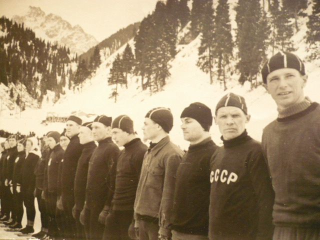 Сборная СССР на Медео, 1951 год